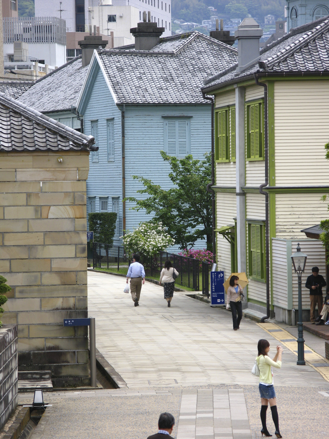 Dejima (reconstruction). Nagasaki, Japan.